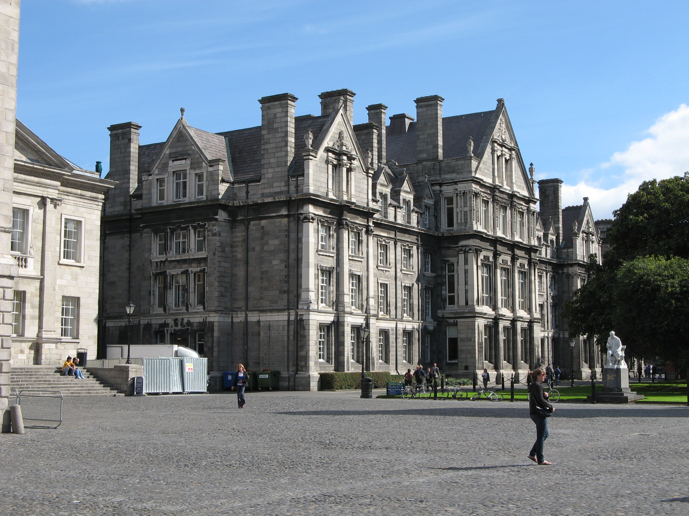 Trinity College, Dublin